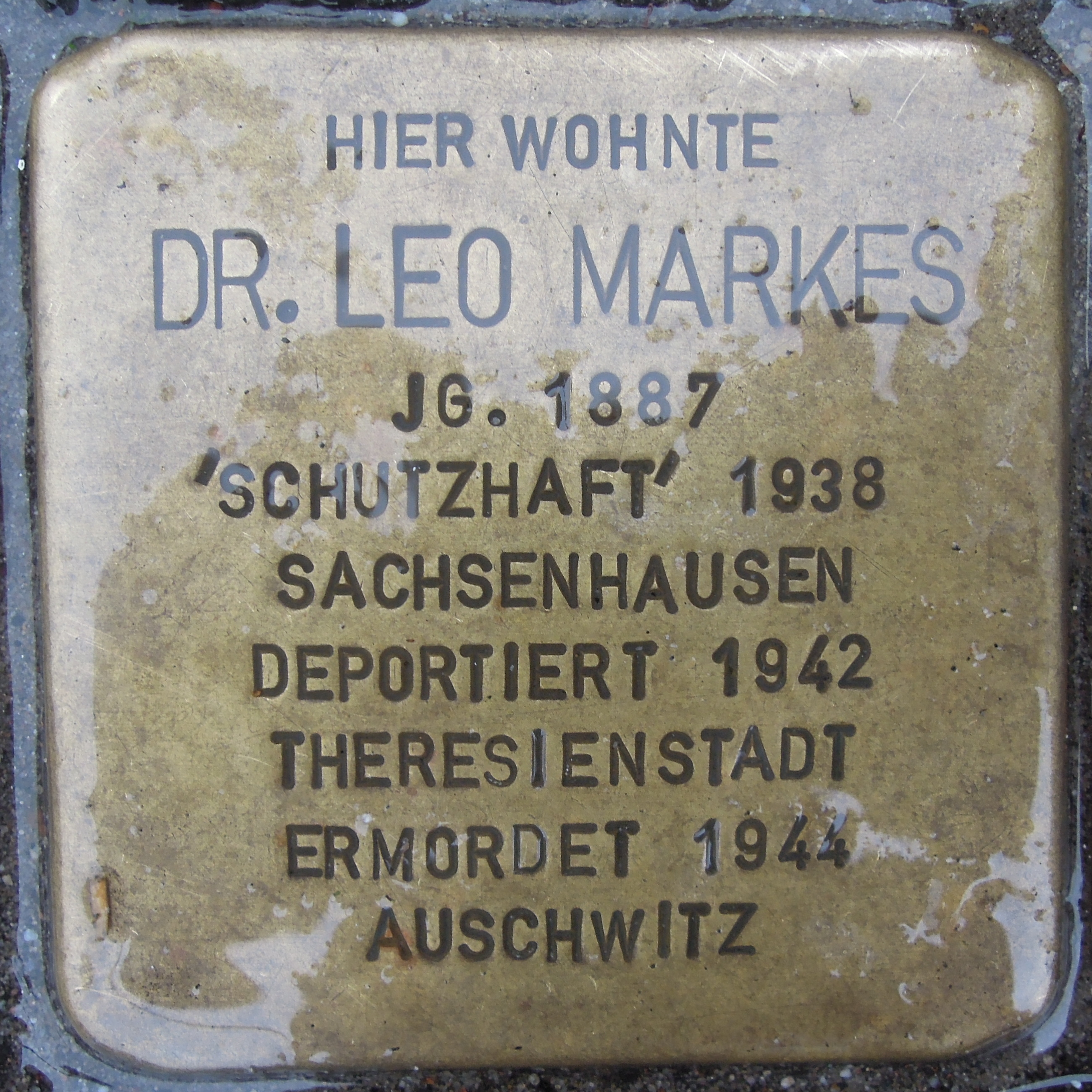 Stolperstein Hattingen Bahnhofstraße 6 für Dr. Leo Markes